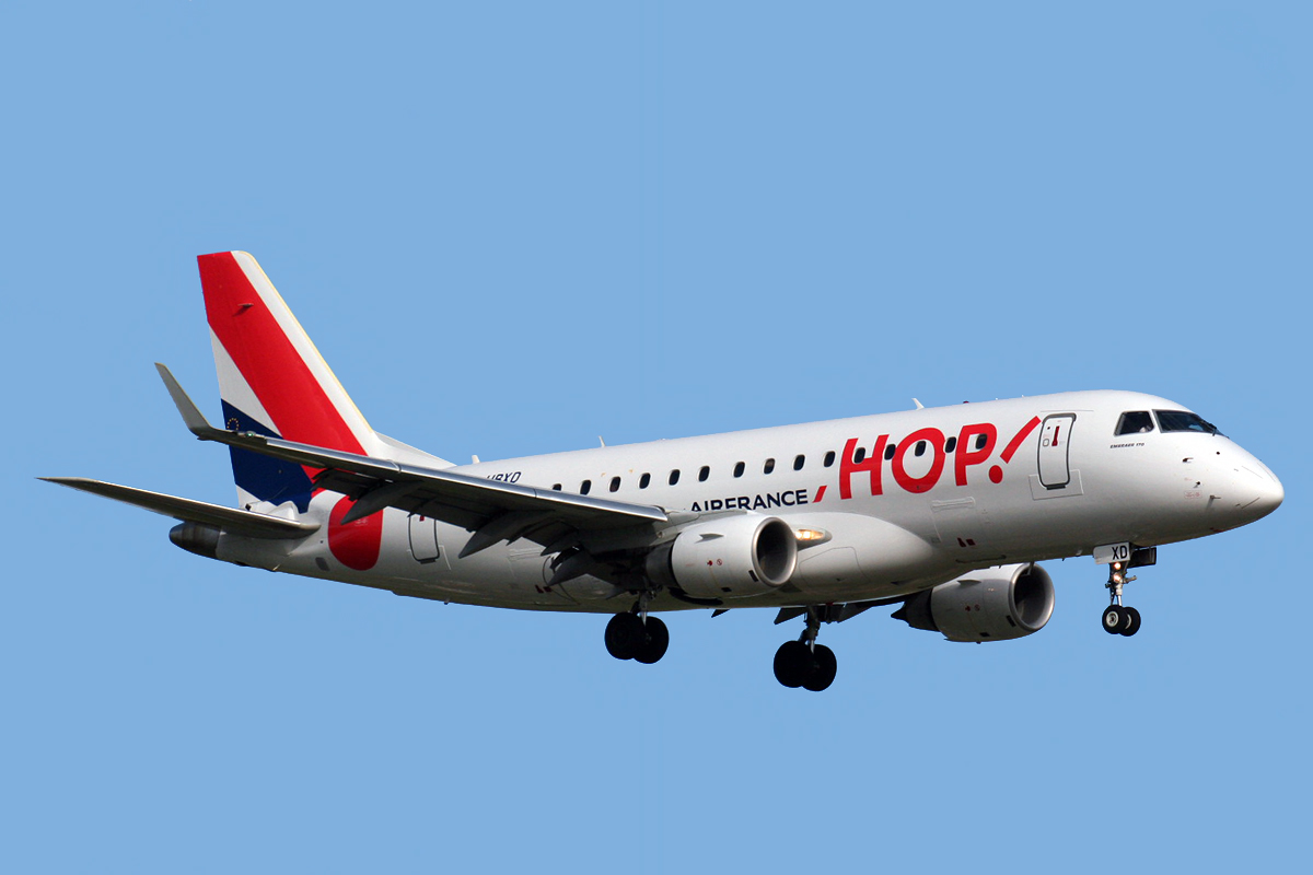 Barcelona El Prat (LEBL/BCN) Airport